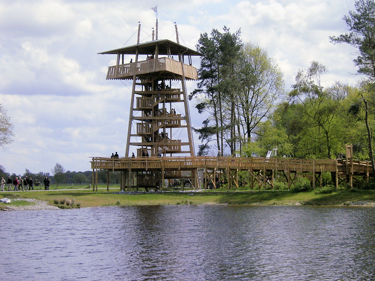 Aussichtsturm am Emssee, Landesgartenschau Rietberg 2008